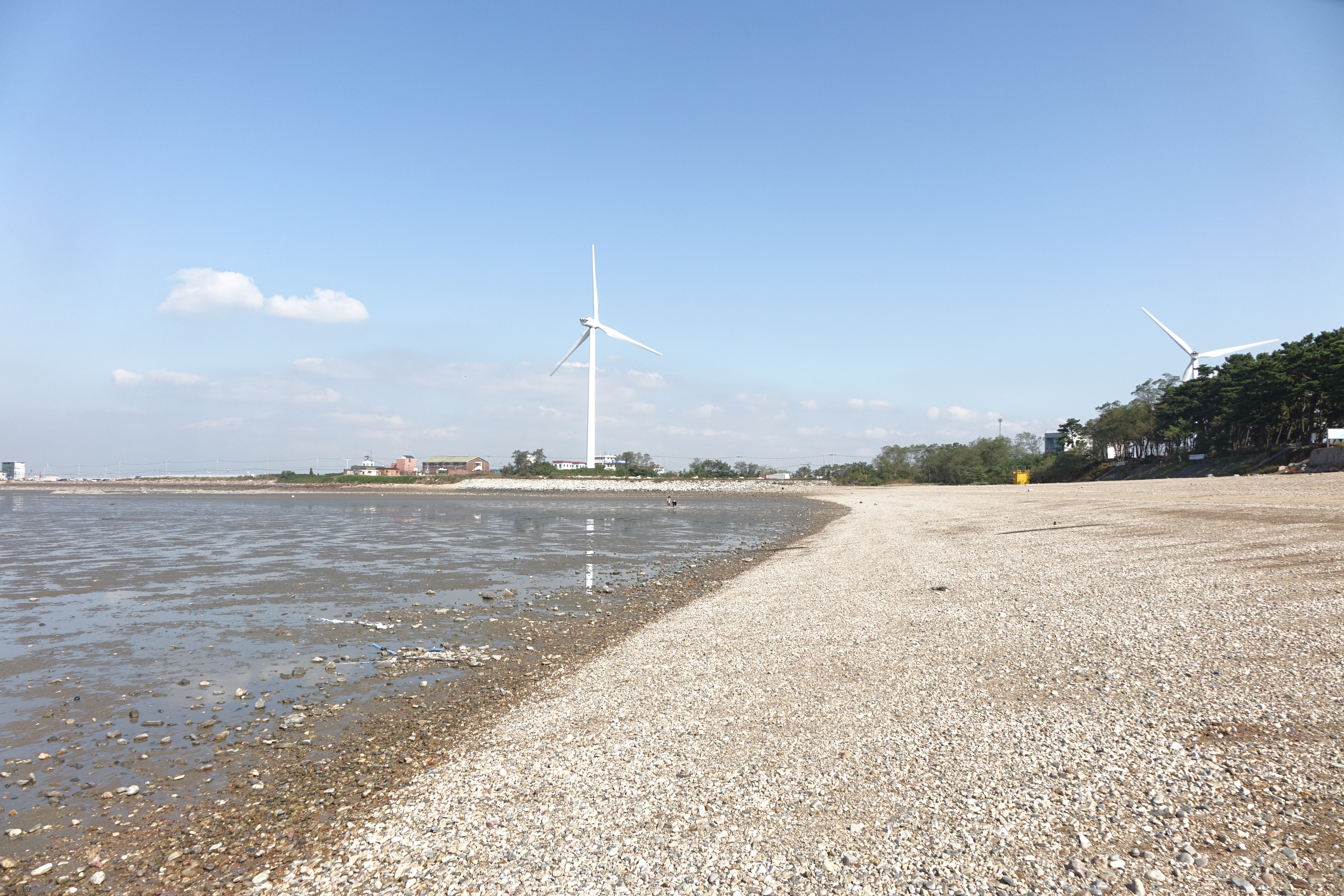 2014년 10월 22일 서초소방서 방배119안전센터 추계 워크샵 대부도